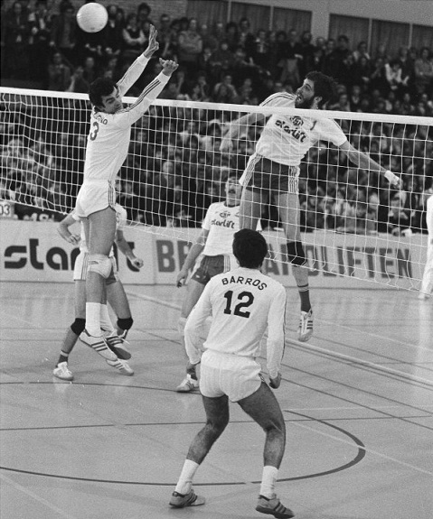 Volleybal Europacup landskampioen Starlift. Blokkeer tegen Real Madrid II